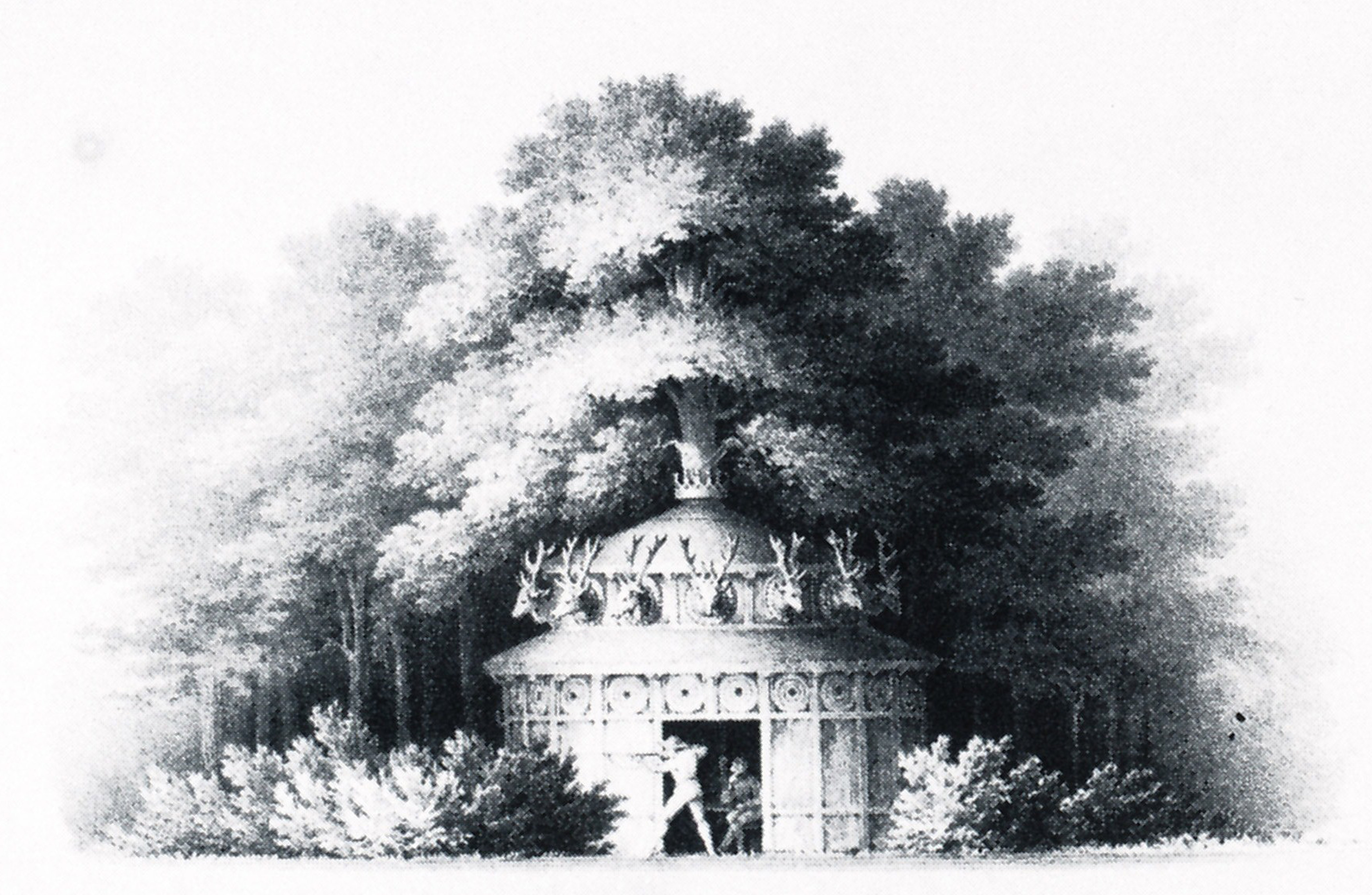 Ansicht der Schießhütte im Park Klein-Glienicke, um 1840